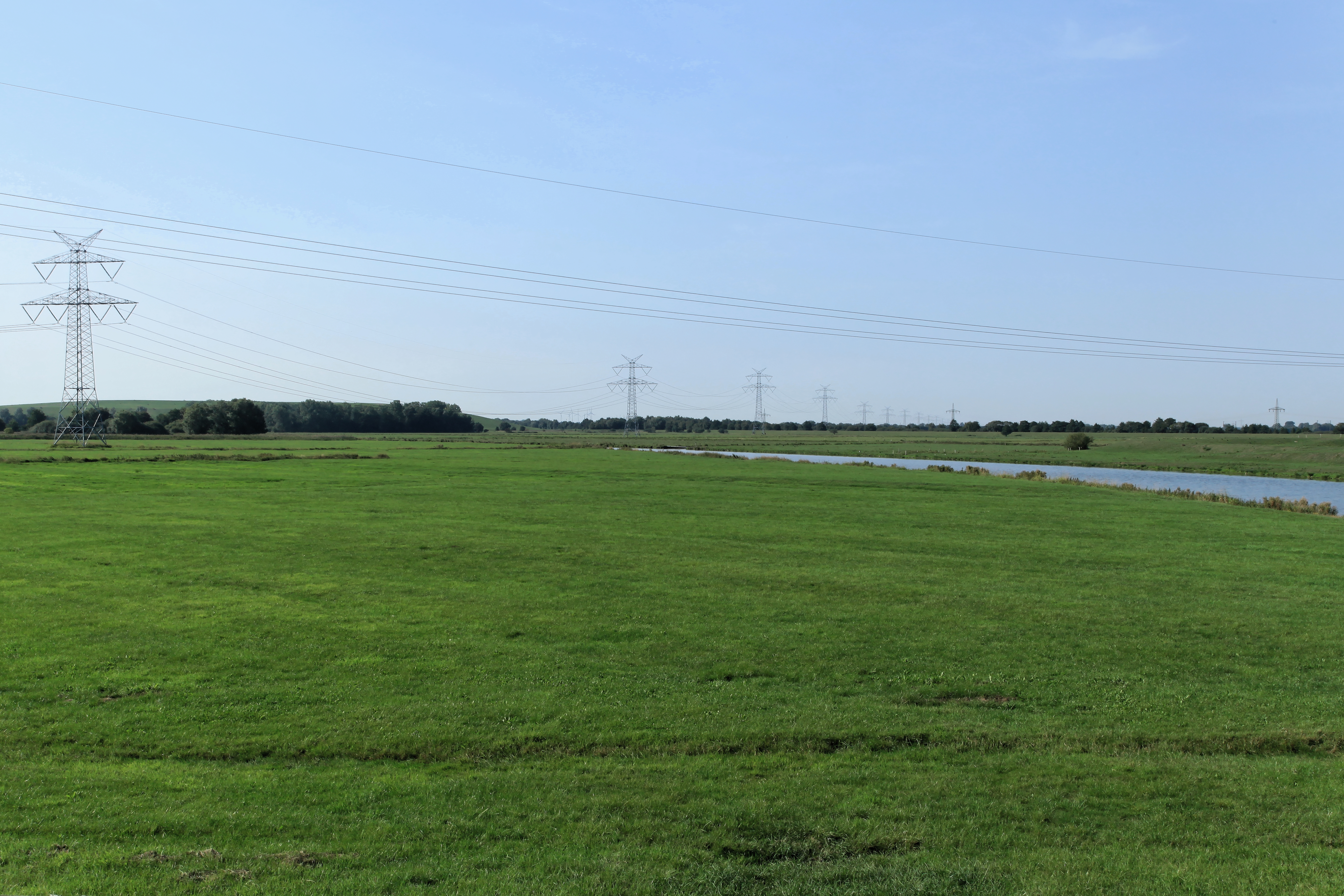 Polderkanal im Polder Leer in Leer (Ostfriesland) (vorne links) und Westoverledingen